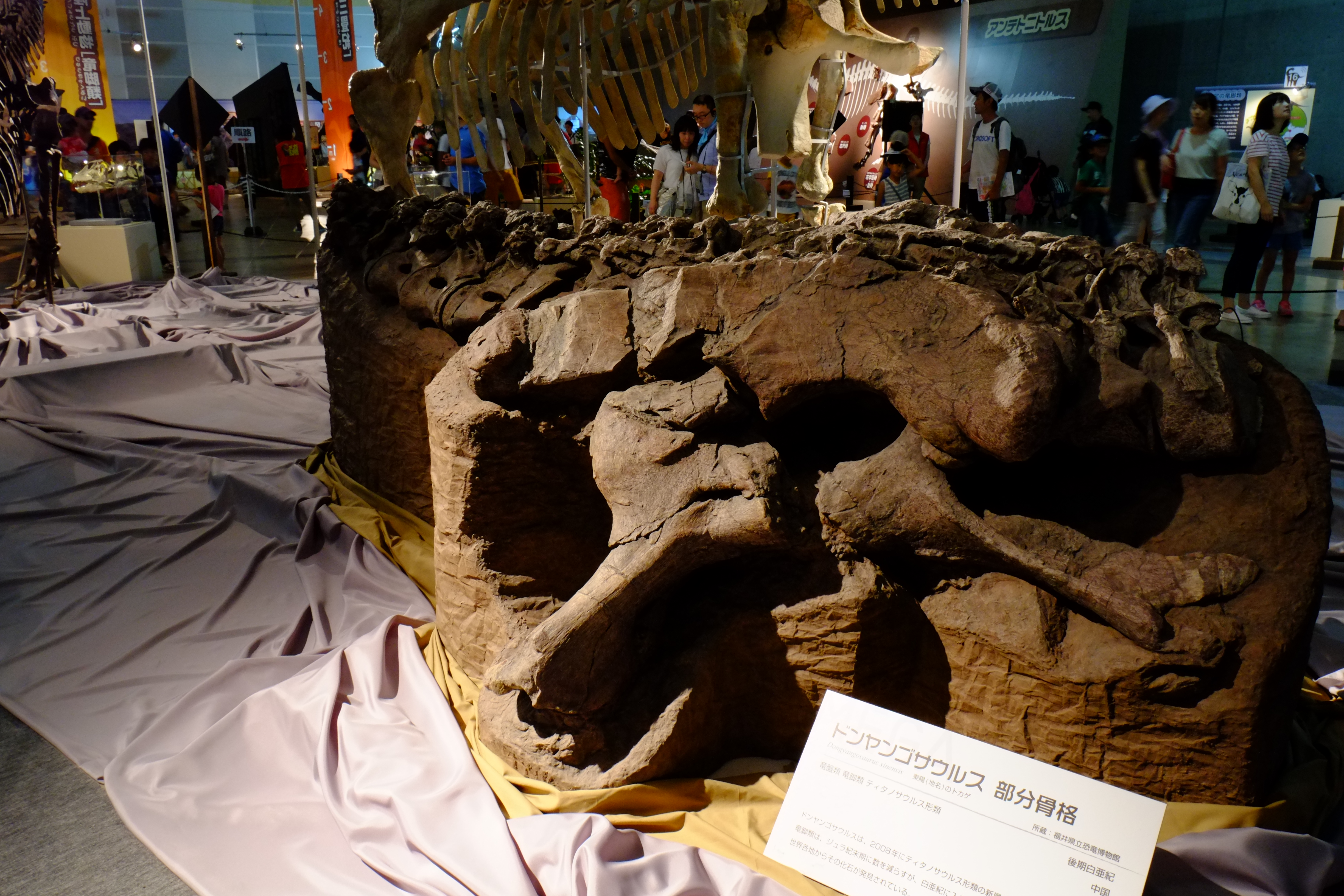 ドンヤンゴサウルス部分骨格。 2008年にティタノサウルス形類の新属として発表されたもの。